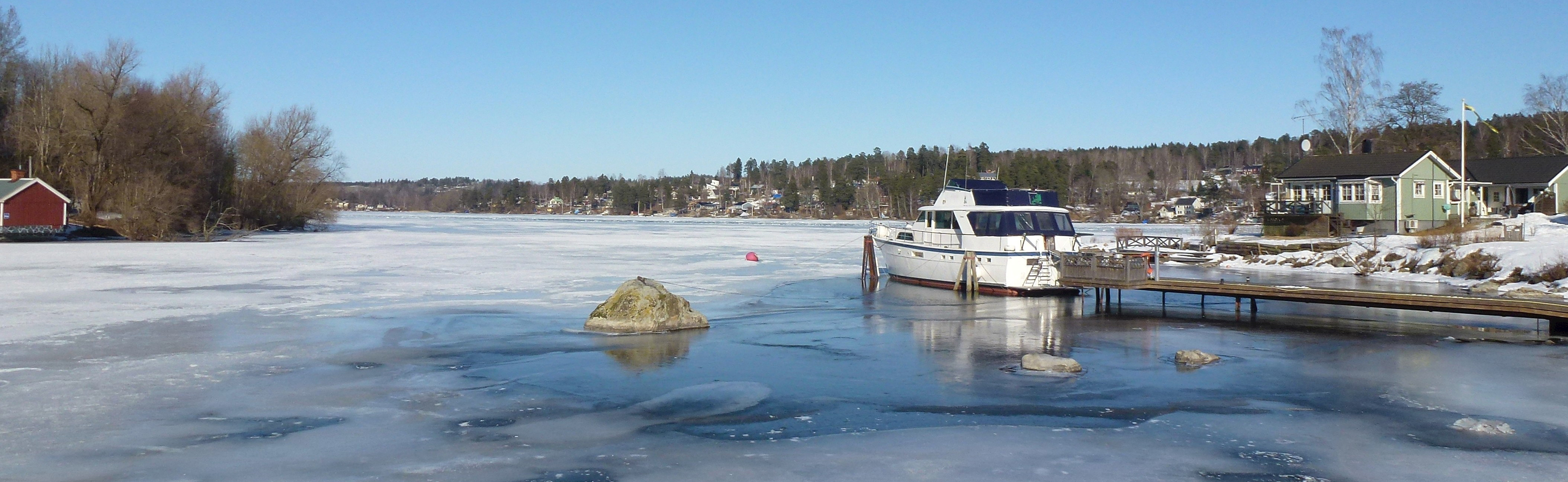 Södertäljeviken mot norr